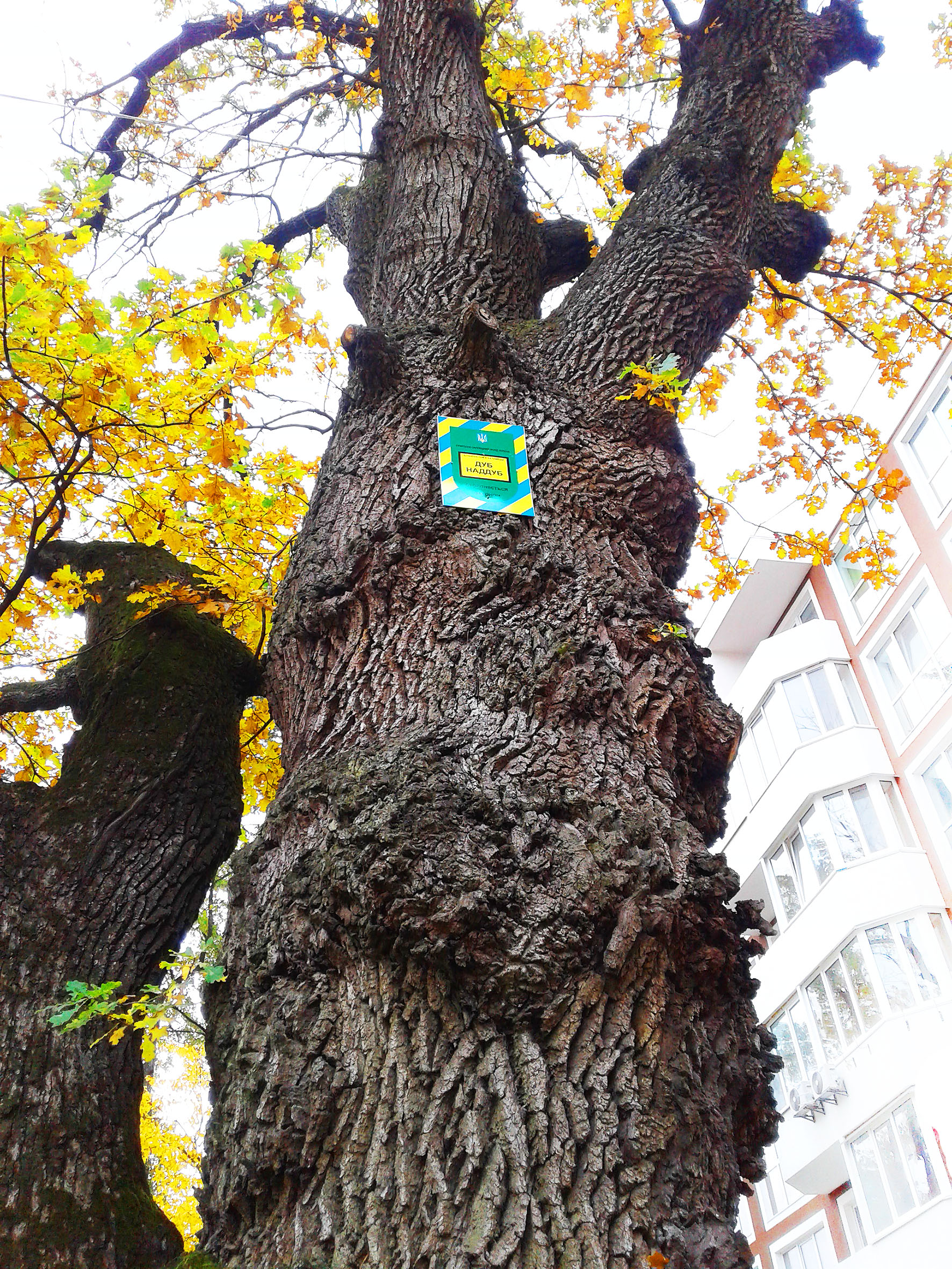 Урочище Пилипів Потік. Ірпінь, вул. Мечнікова.